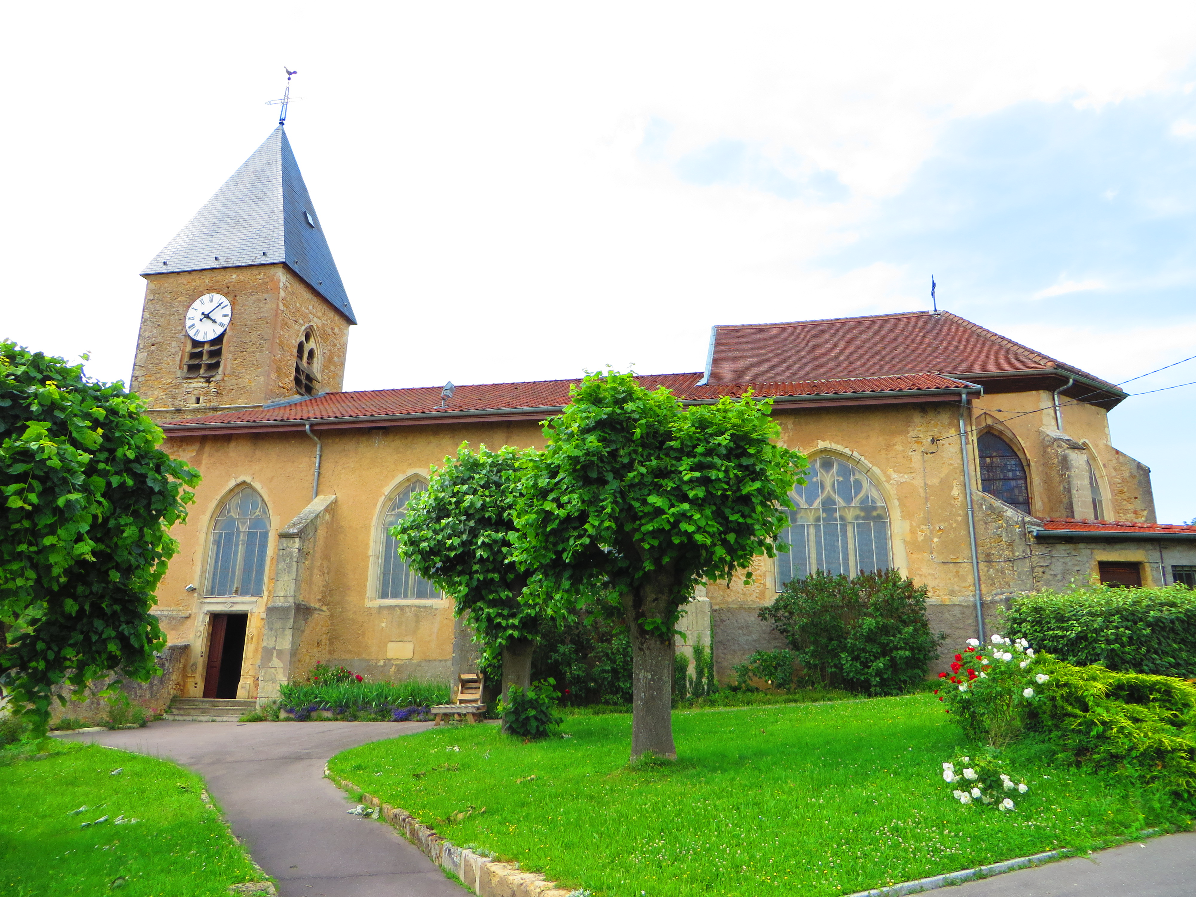 Eulmont Église Saint-Remy